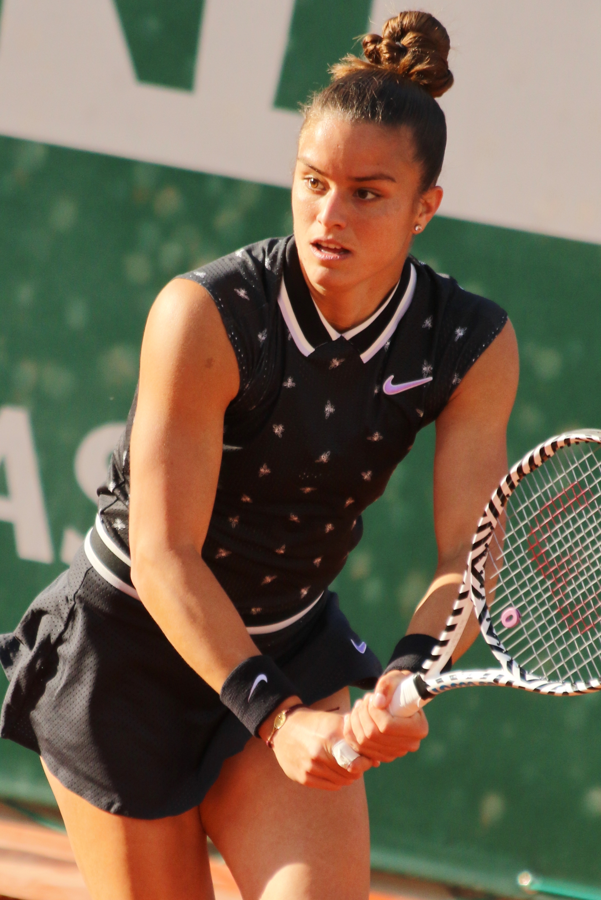 Sakkari RG19 (41)